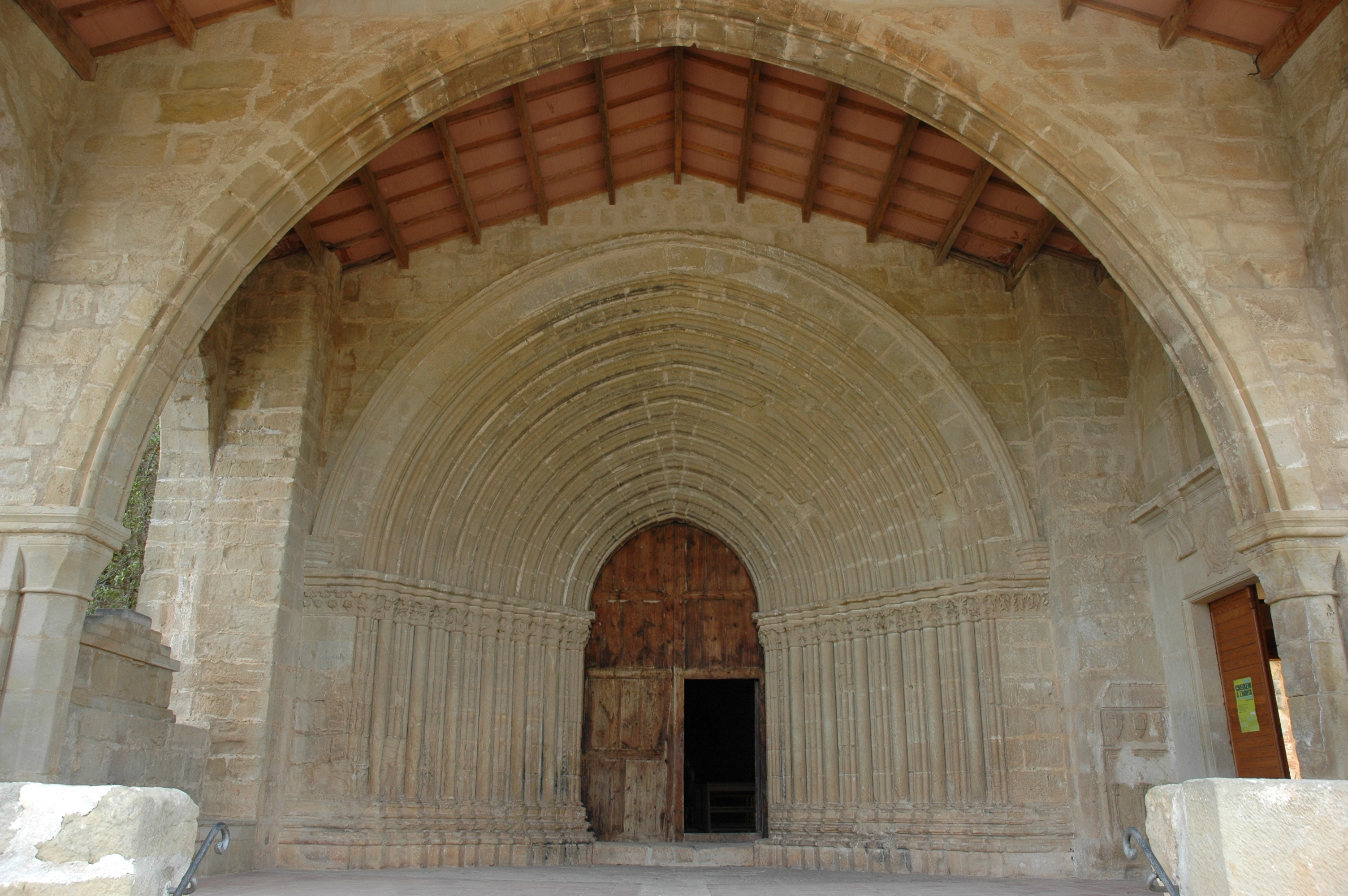 Convent de Sant Salvador d'Horta - Atri